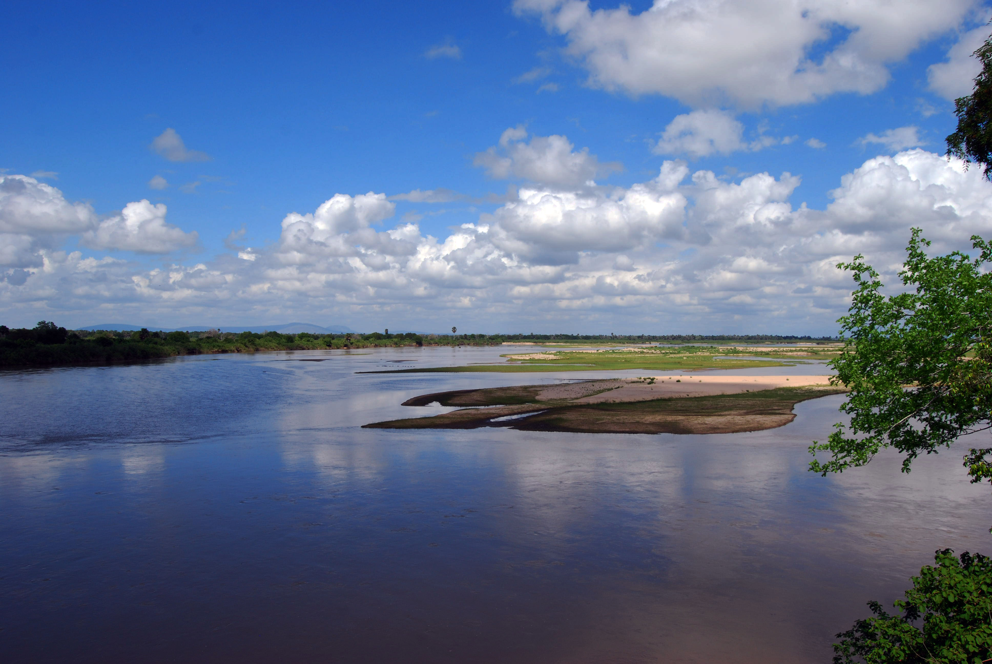 Река Руфиджи в ловния резерват Селъс, Танзания